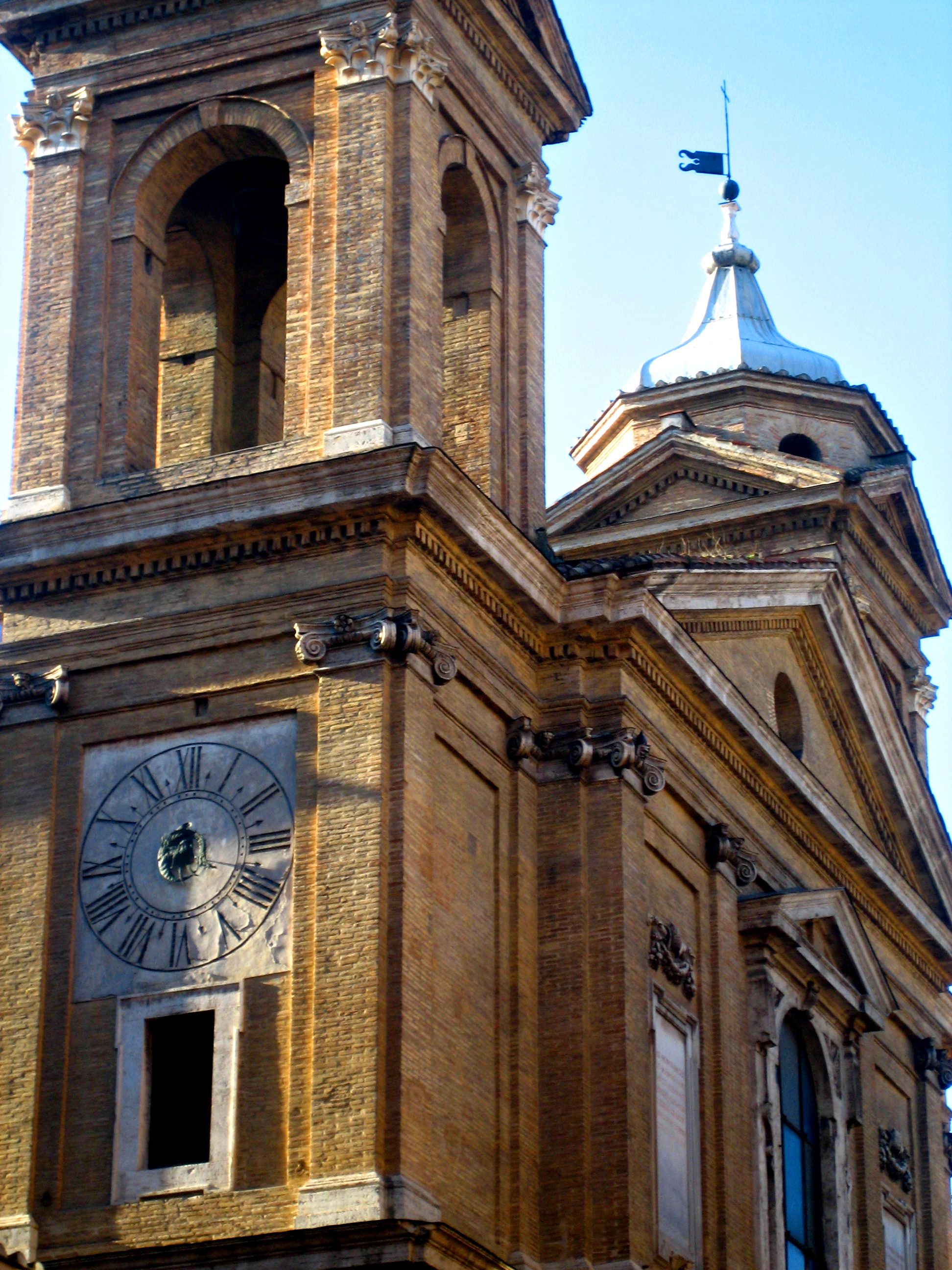 Sant'Atanasio, afternoon sun on via del Babuino.